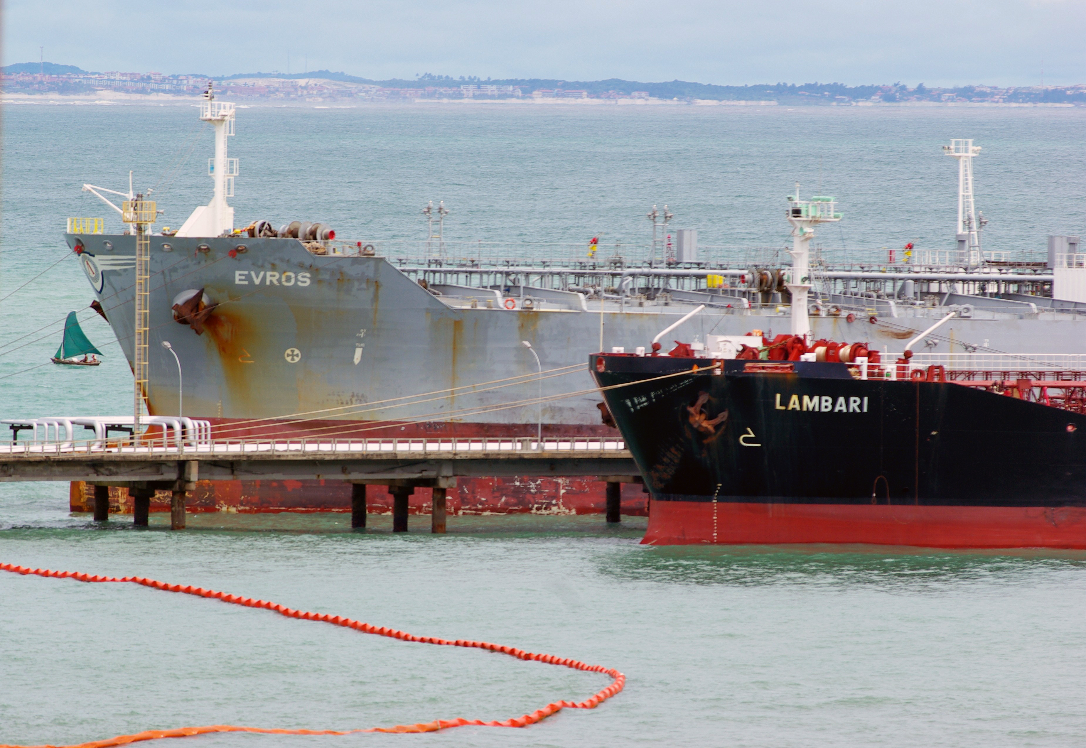 Feriado no Porto do Mucuripe - CE